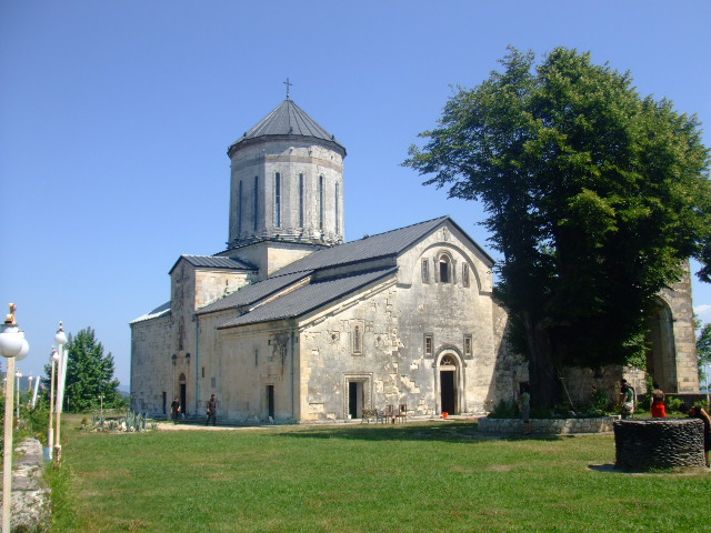 Martvili monastery